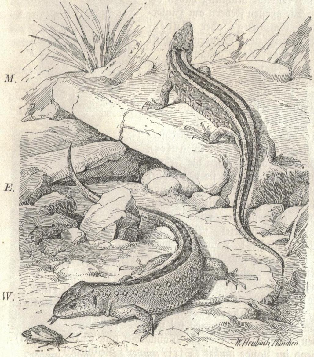 สัตว์เลื้อยคลานขนาดเล็กลักษณะคล้ายกิ้งก่า สัตว์ต้นตระกูลของสัตว์เลื้อยคลาน.